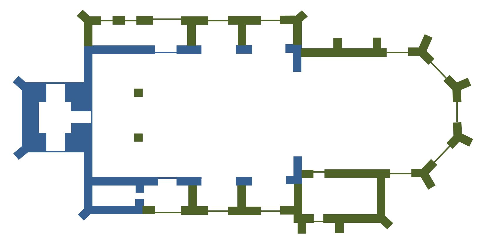 Grundriss der Pfarrkirche St. Laurentius Altheim, OÖ mit Bauepochen (nach Thomas C. Pumberger).